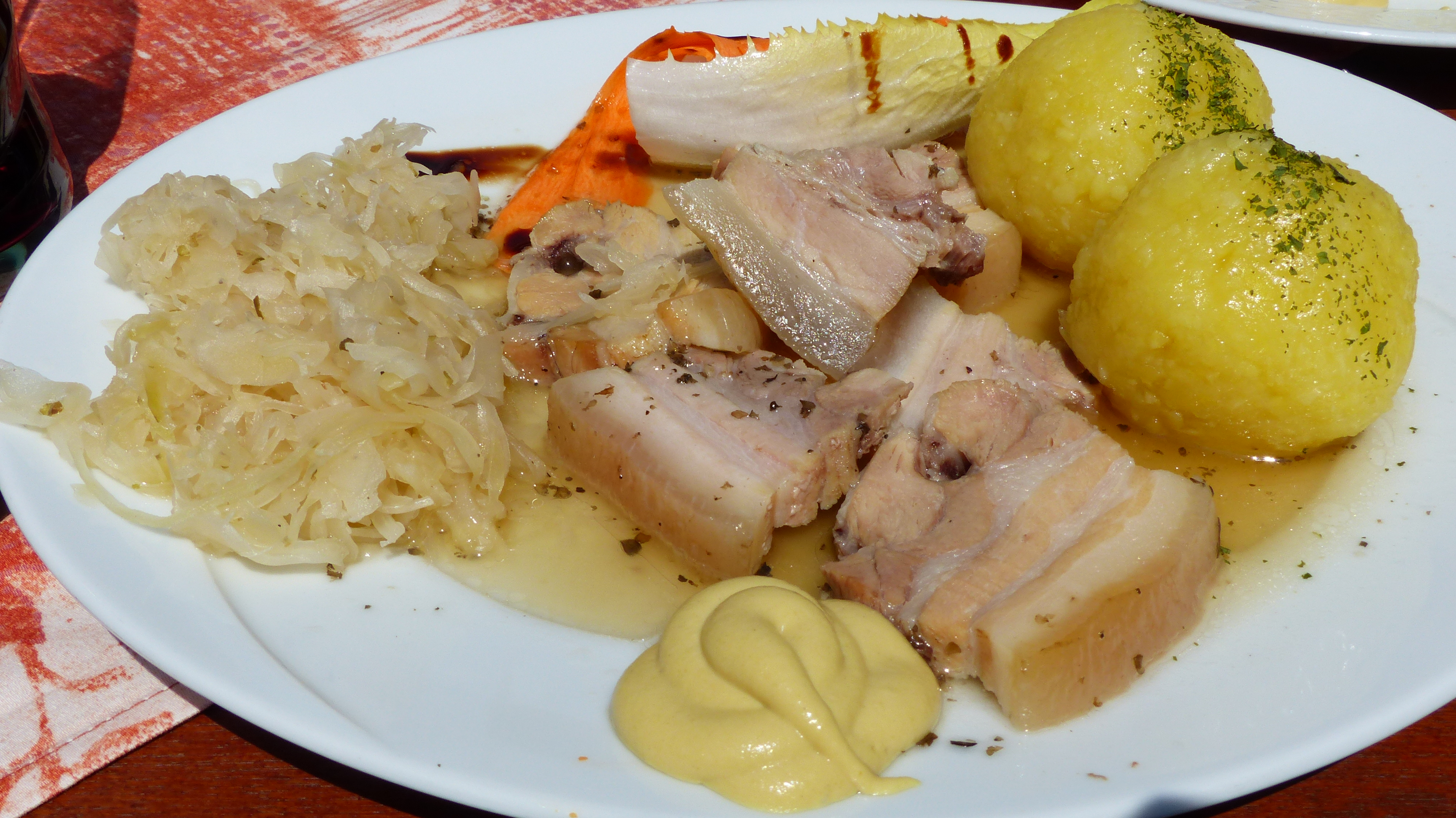 Wellfleisch mit Sauerkraut und Klößen, Gasthaus Zum Landberg, Herzogswalde, Sachsen